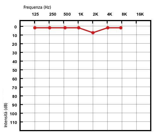 Audiogram przedstawiający prawidłowy słuch